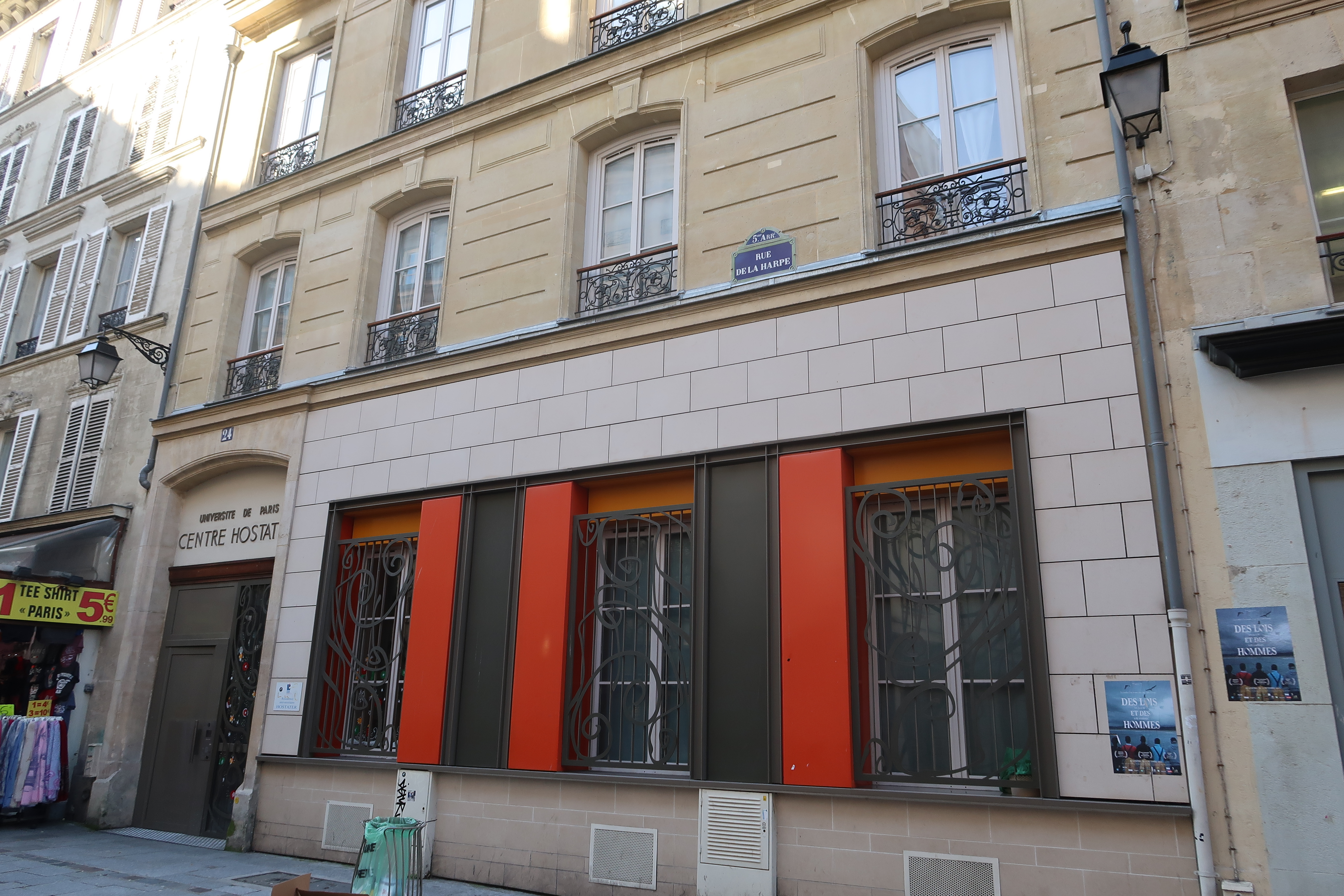 Centre Hostater (université de Paris), 24 rue de la Harpe (Paris, 5e).